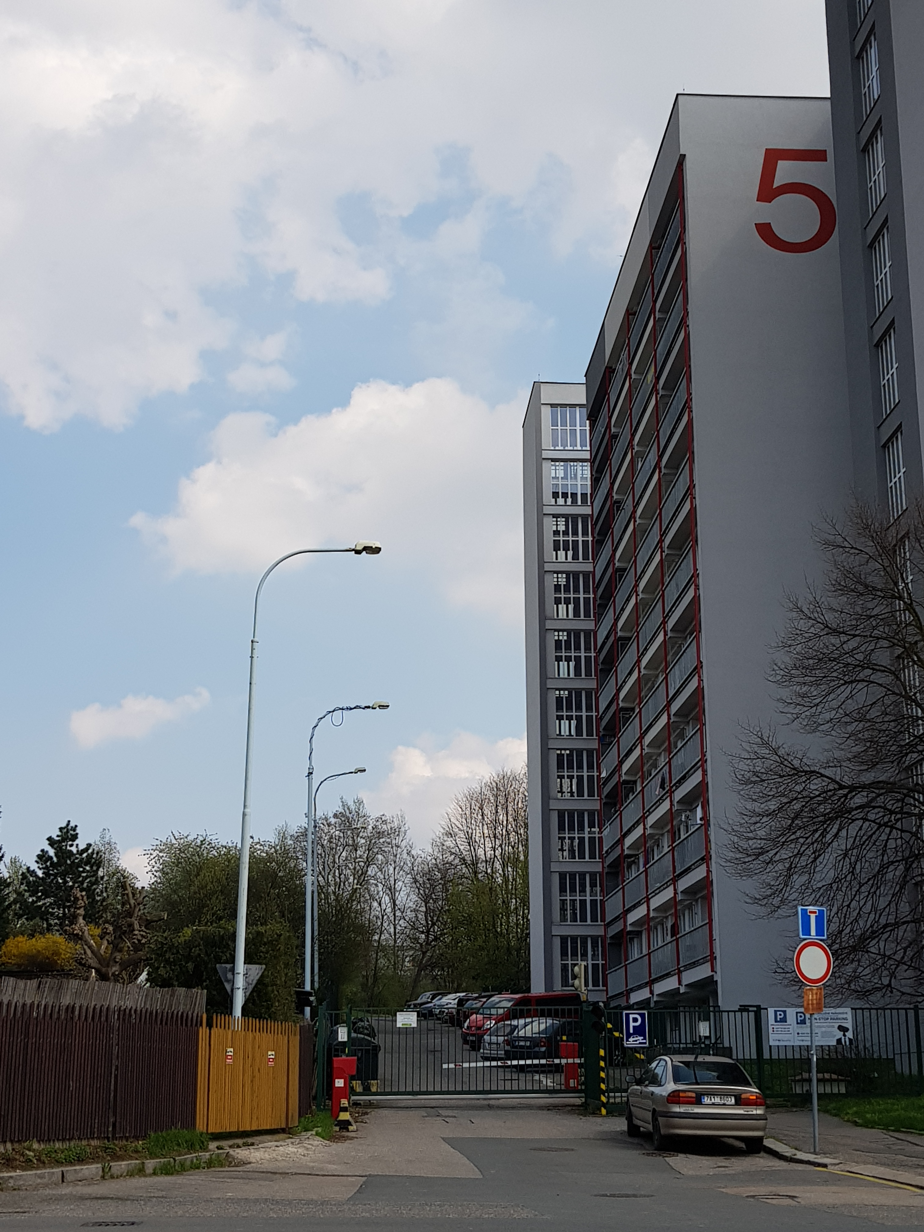 Nástrojářská ulice, Praha 14 - Hloubětín